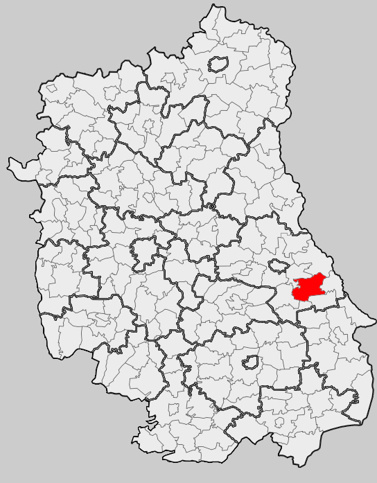 Map of gmina Żmudź, Chełm county, Lublin voivodship Mapa gminy Żmudź, powiat chełmski, województwo lubelskie